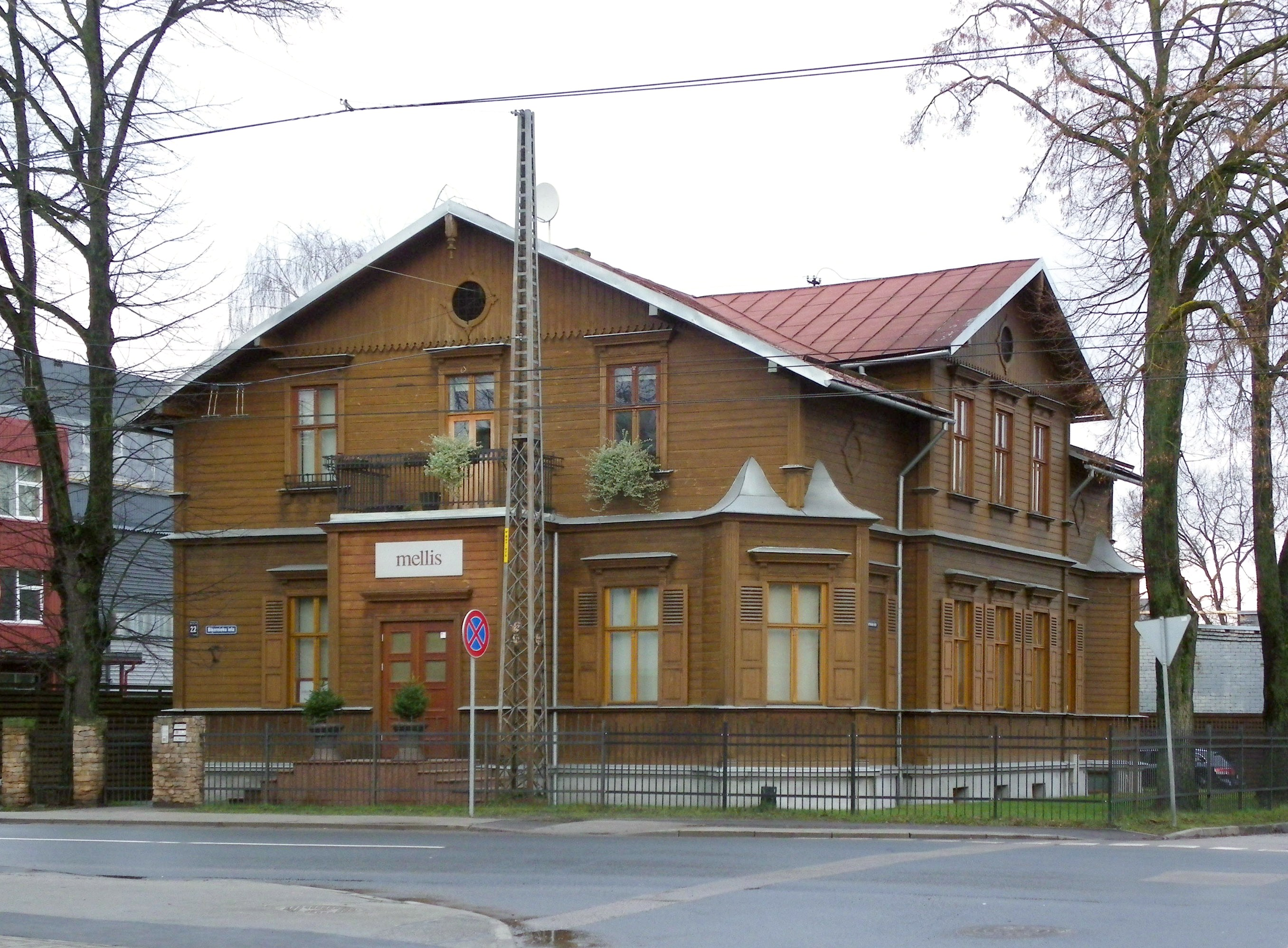 Biķernieku iela 22